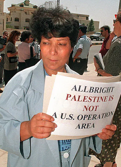 Leila Khaled contra la militarización de Palestina.